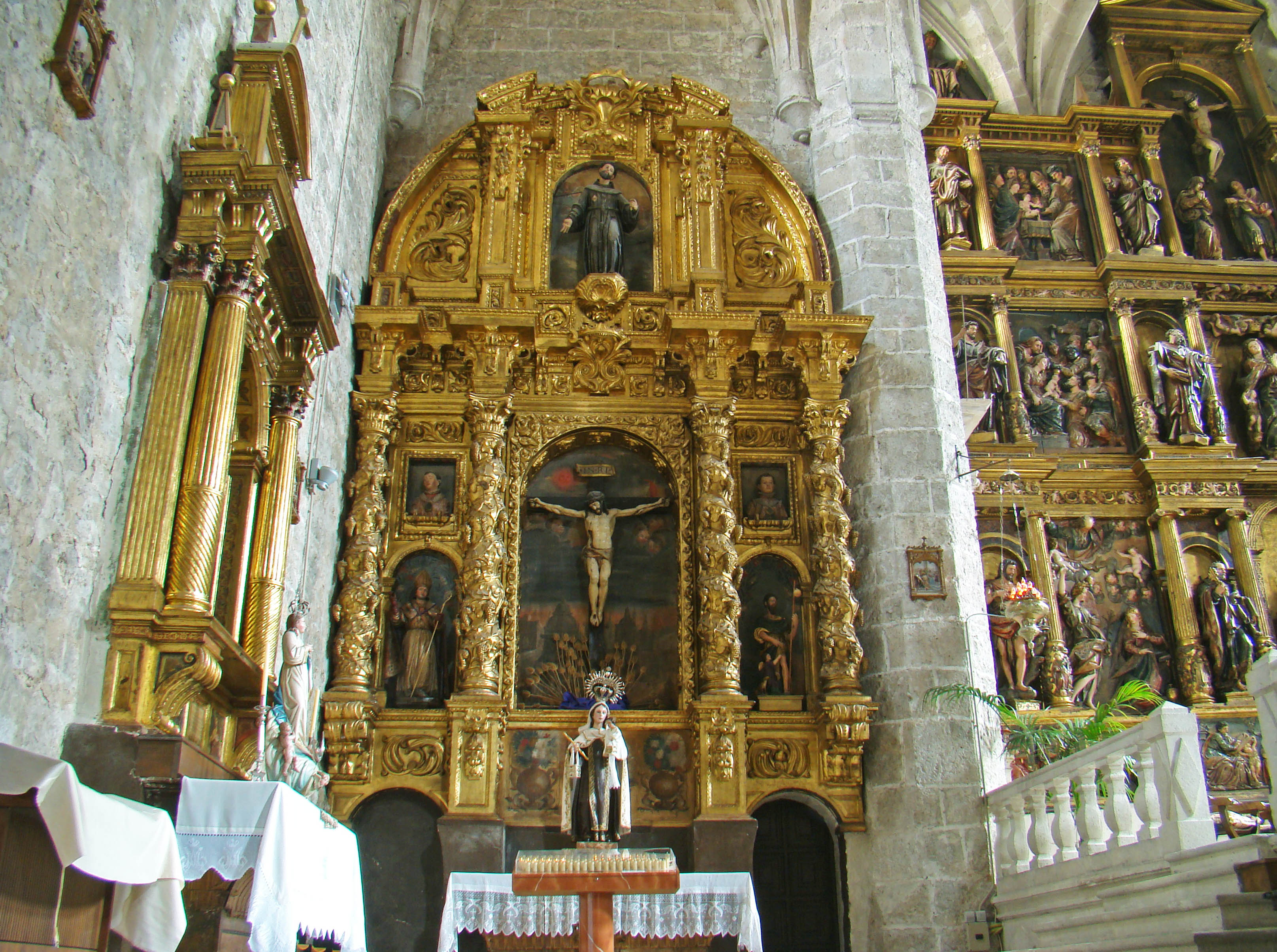 Iglesia de la Asunción en el municipio de Tudela de Duero, provincia de Valladolid, España. Retablo del Crucifijo.